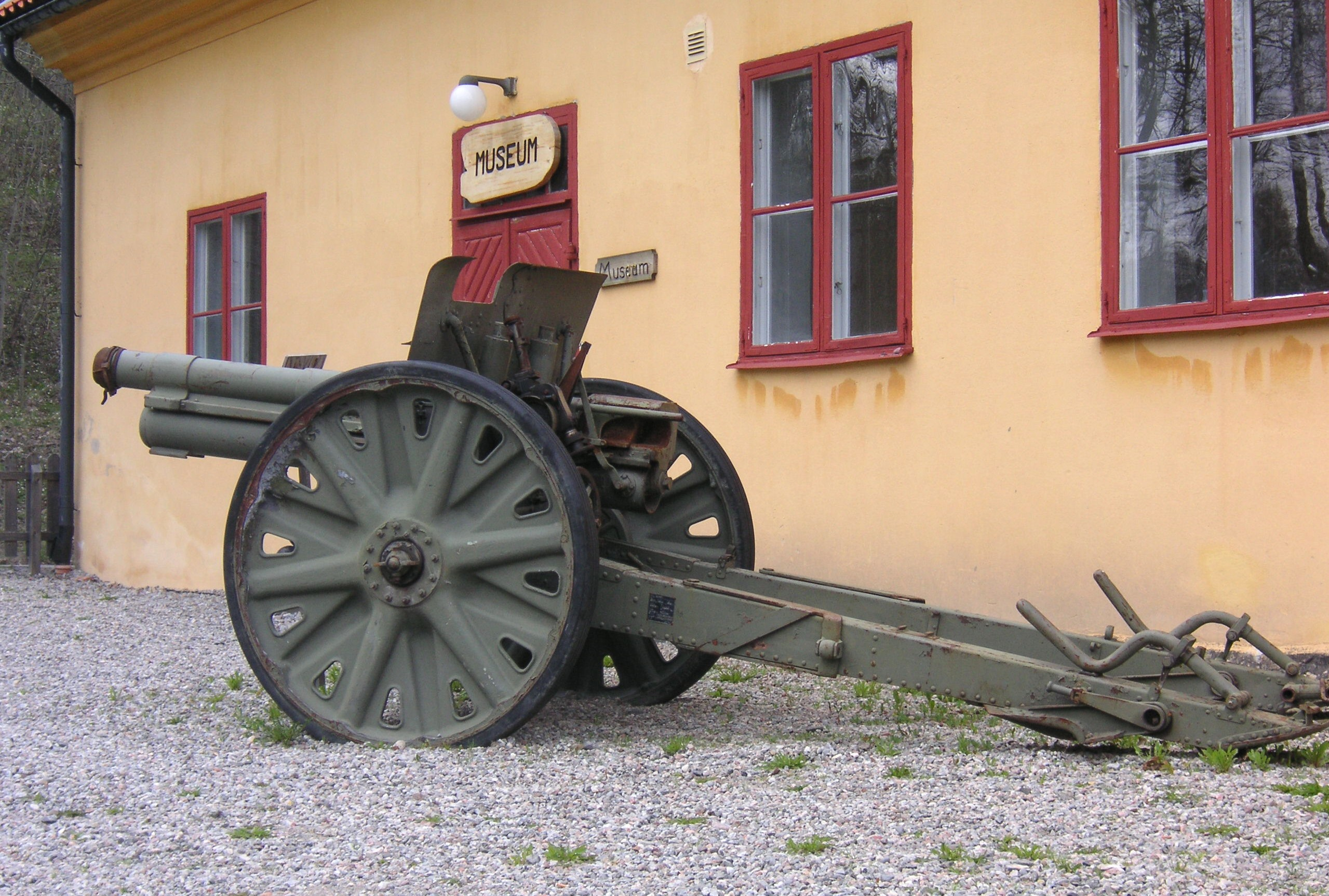 7,5 cm kanon M/1902-33 BOFORS "Friedrich Krupp von Essen" vid Hemvärnets stridsskola i Vällinge